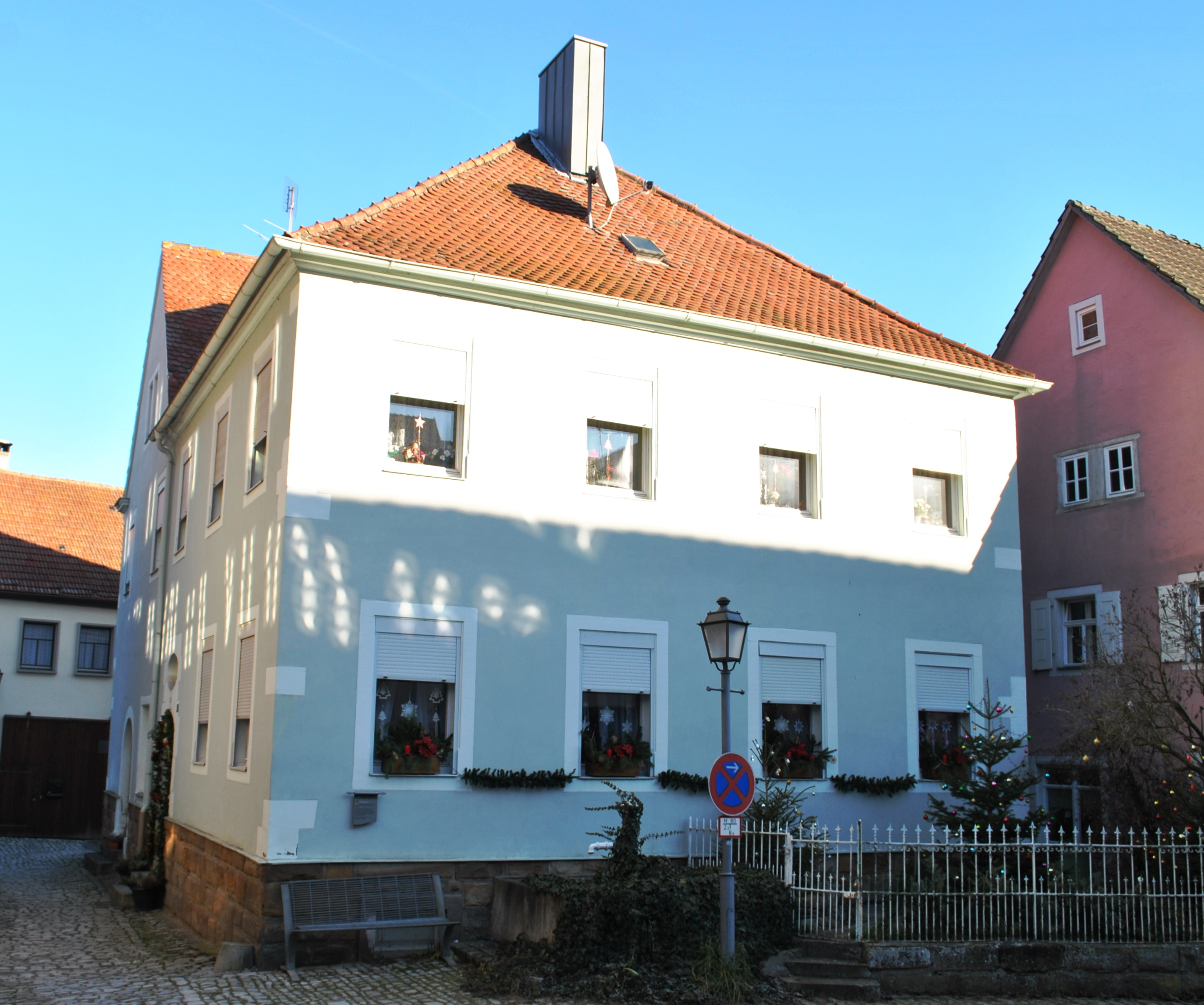 Ehemalige Synagoge in Prichsenstadt, Nähe Freihof